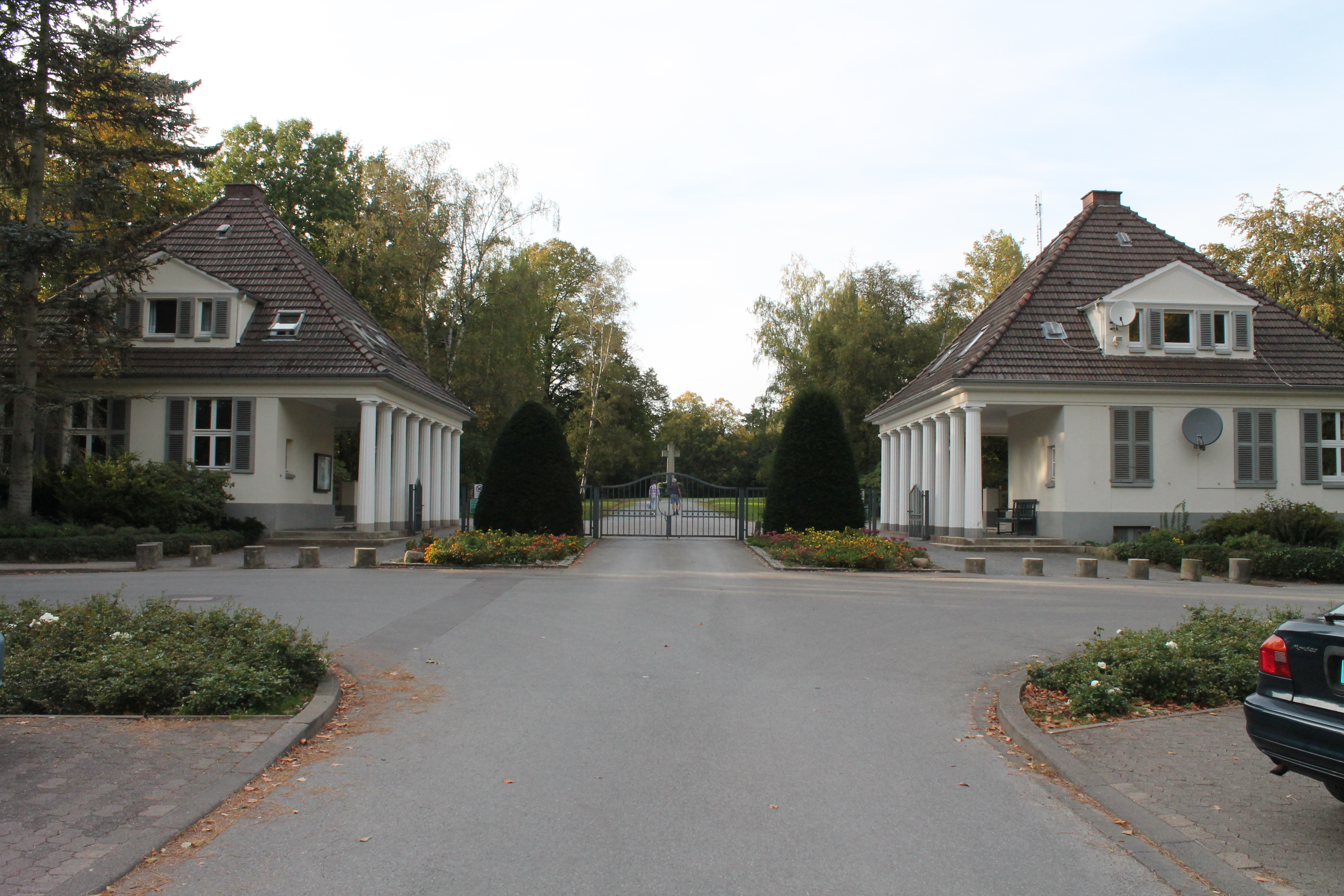 Herford, Baudenkmal 441